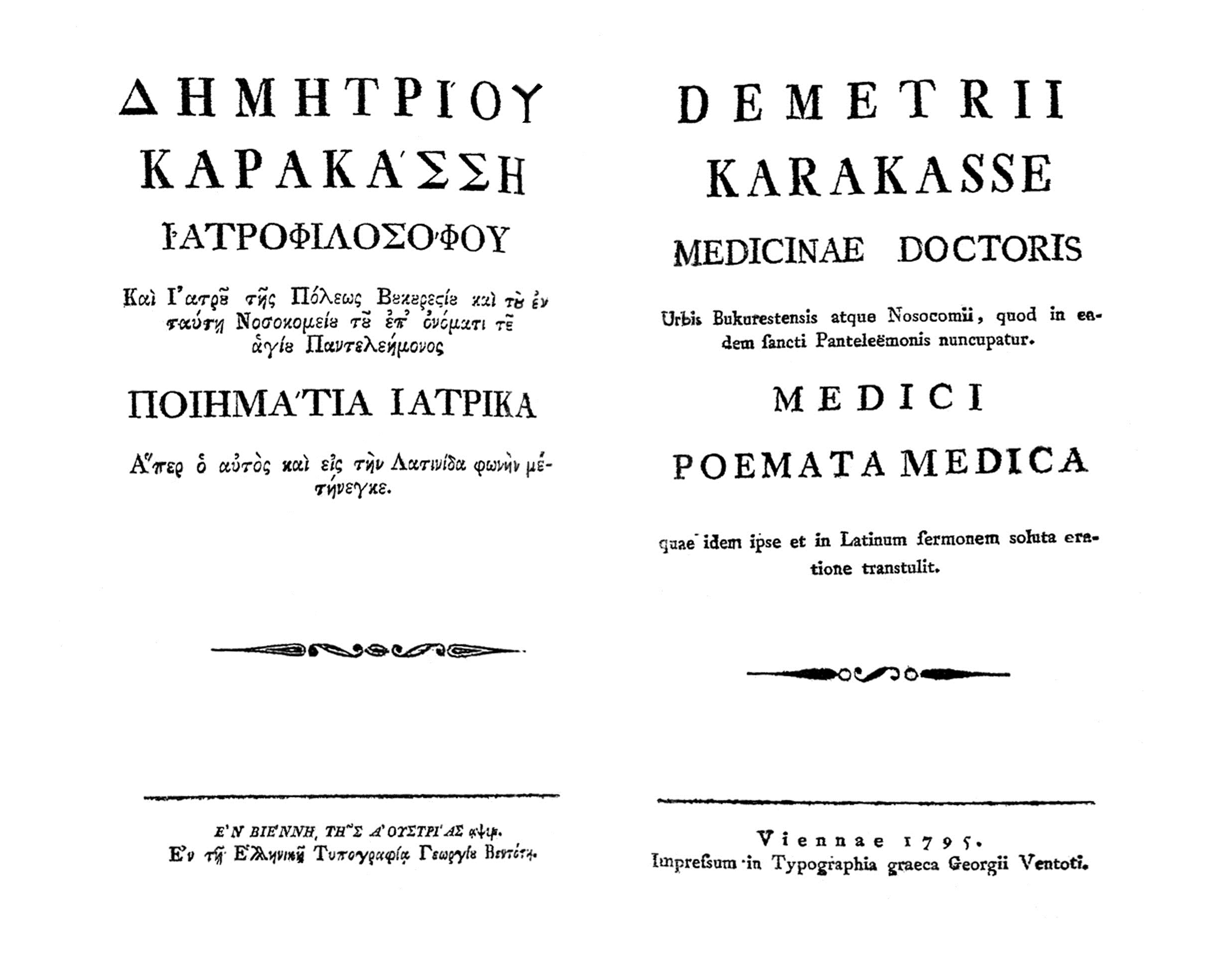 Βιβλίο του 18ου αιώνα, γραμμένο στα Ελληνικά και Λατινικά, που τυπώθηκε στη Βιέννη.